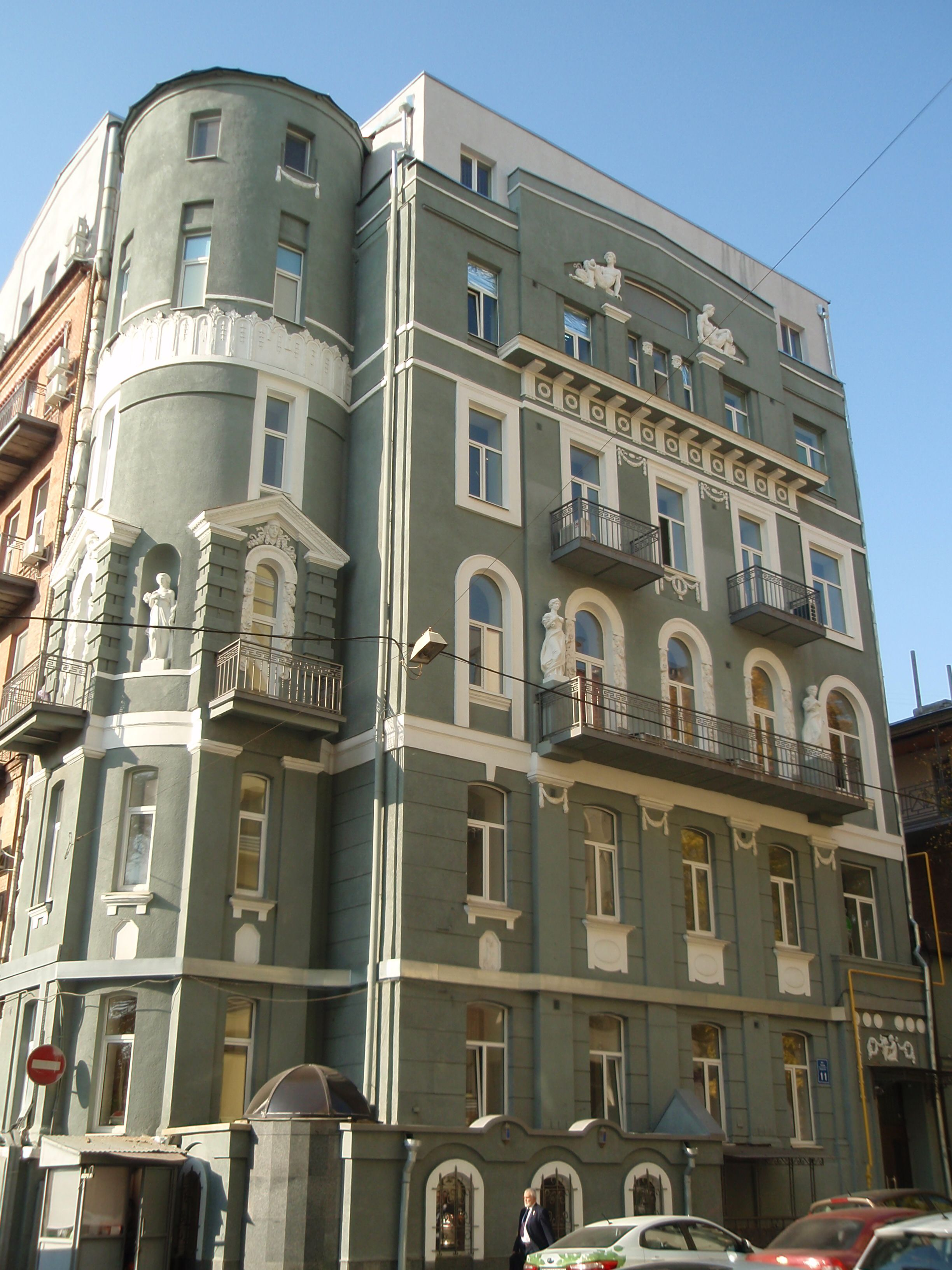 Житловий будинок, Харків, вул. Гоголя, 11